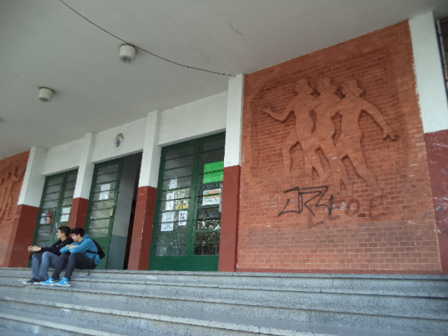 Liceo Manuel Rosé de Las Piedras. Ubicada en el departamento de Canelones